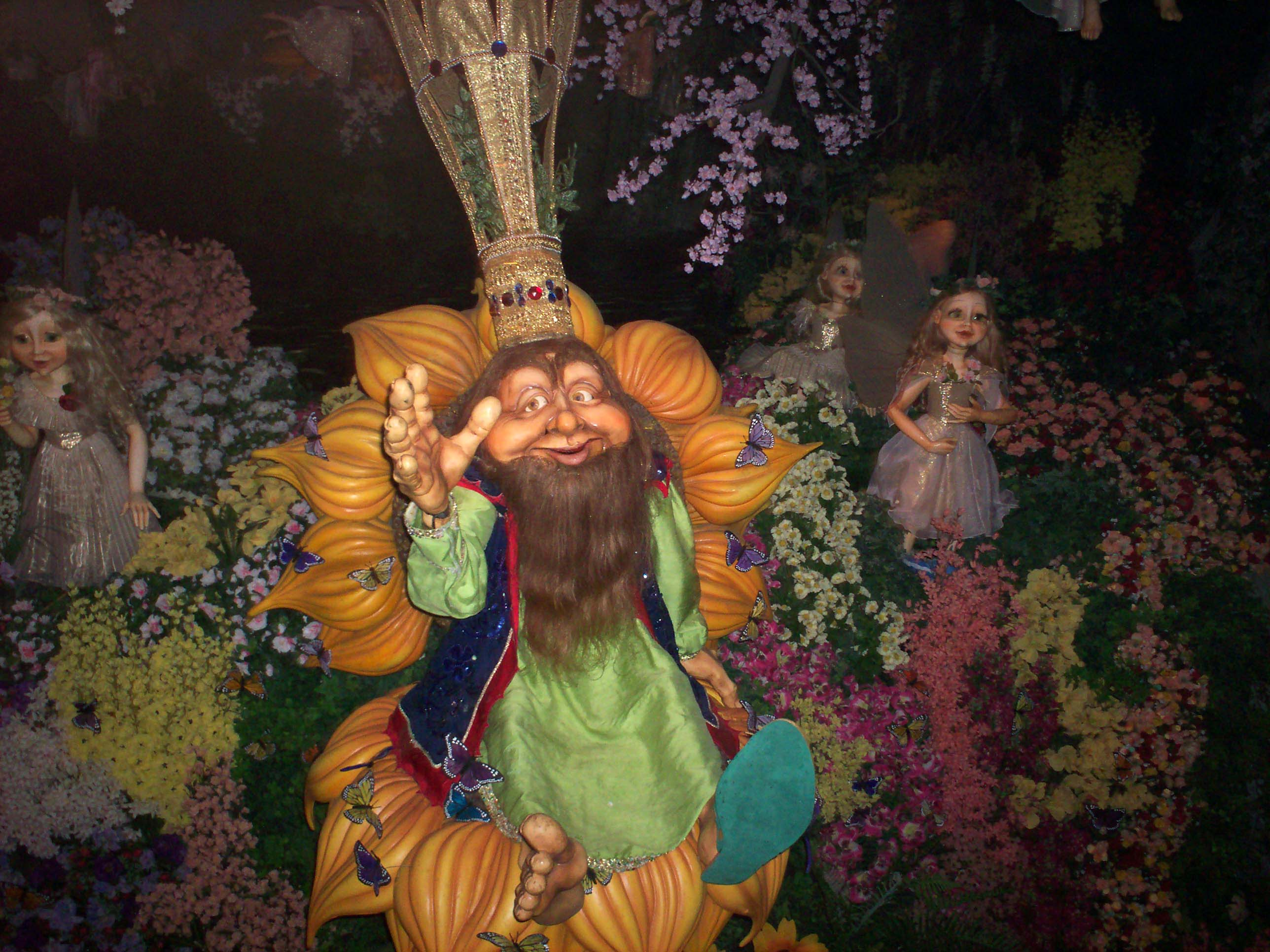 Koning Oberon Droomvlucht